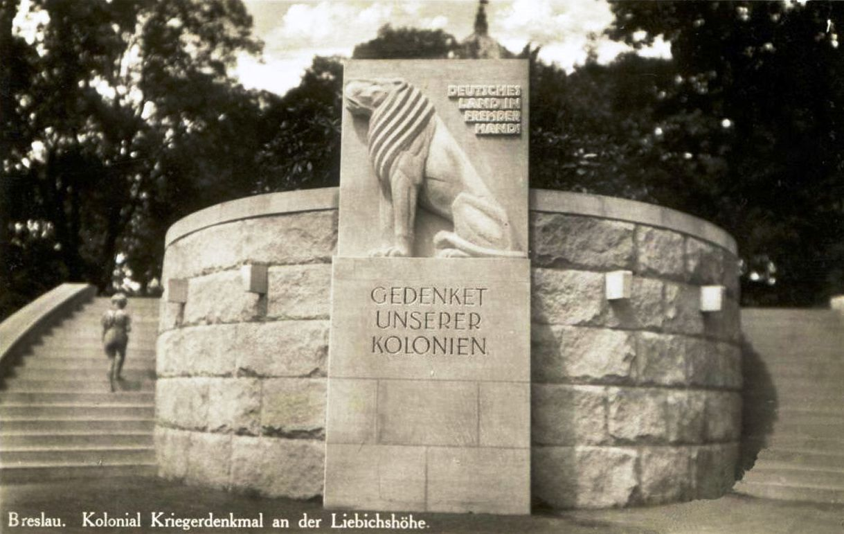 Kolonial Kriegerdenkmal, 1937, an der Liebichshöhe in Breslau